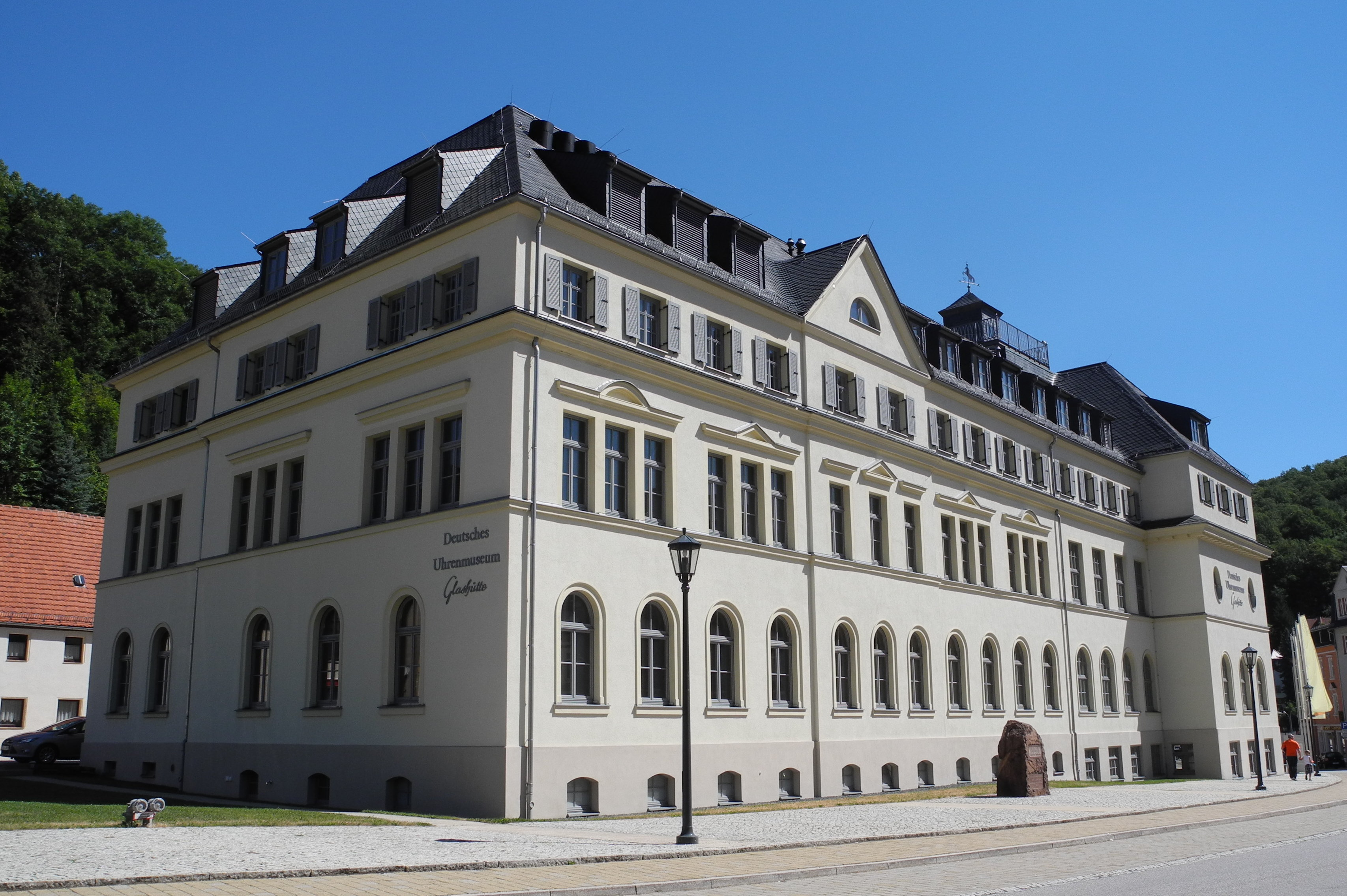 Hier sieht man das ehemalige Gebäude der Uhrmacherschule Glashütte, hier ist inzwischen das Deutsche Uhrenmuseum Glashütte untergebracht.